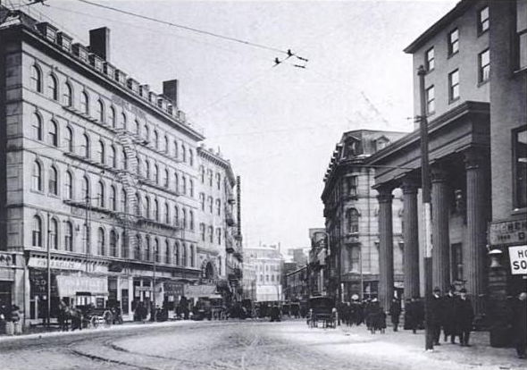 Boston, Massachusetts